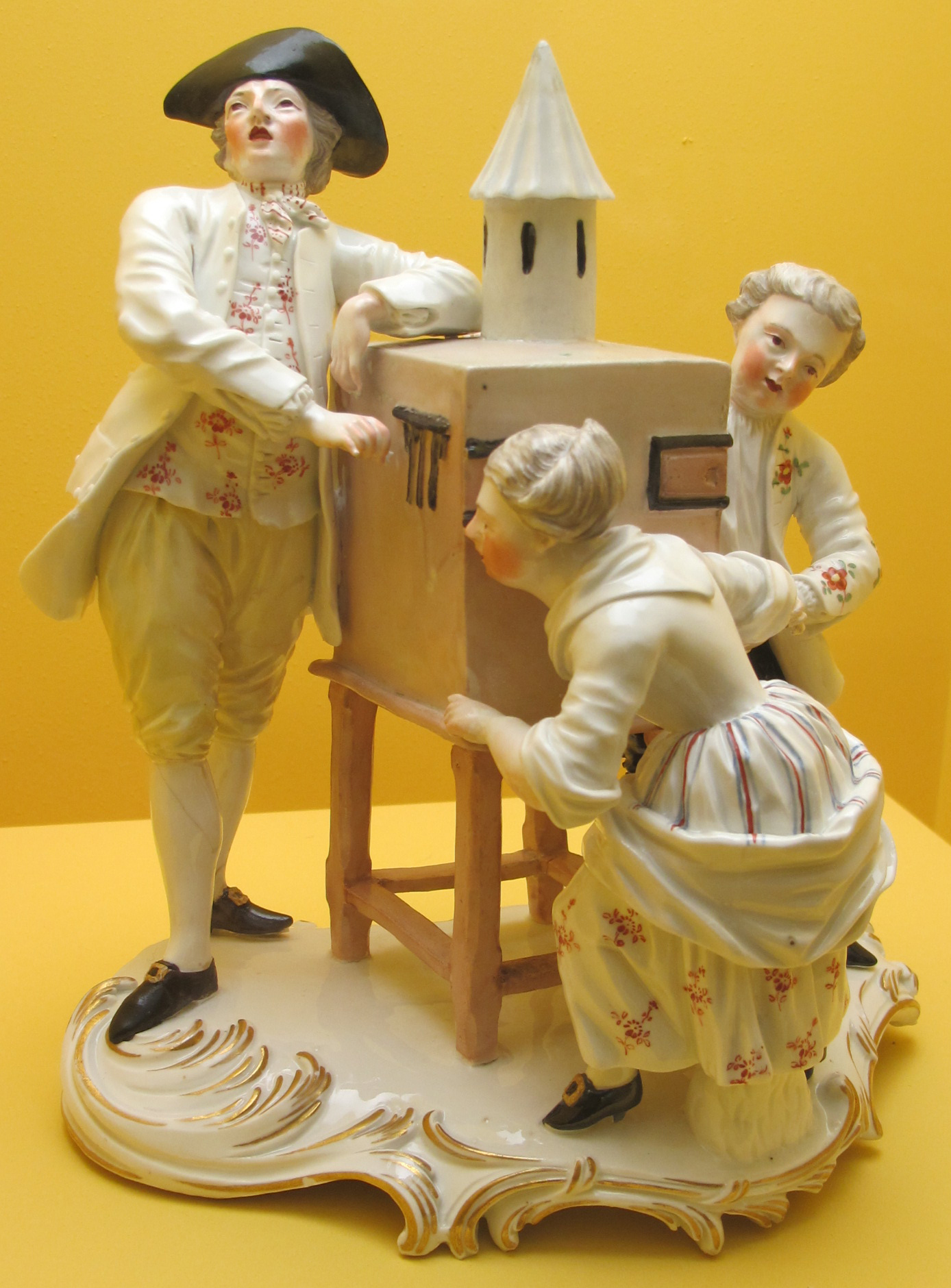 Frankenthal, johann friederich lück, il mondo nuovo, 1758-63